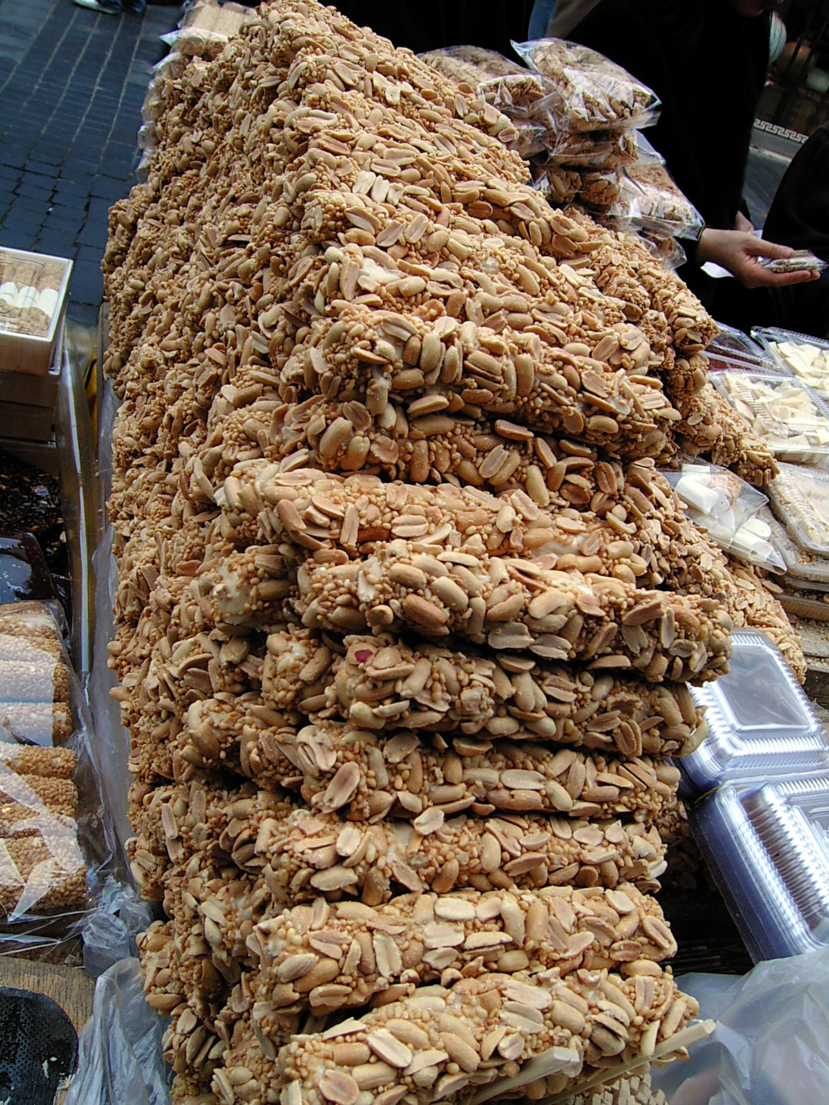 Ttangkong yeot, a Korean traditional candy.